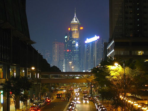 Hong Kong night lighting